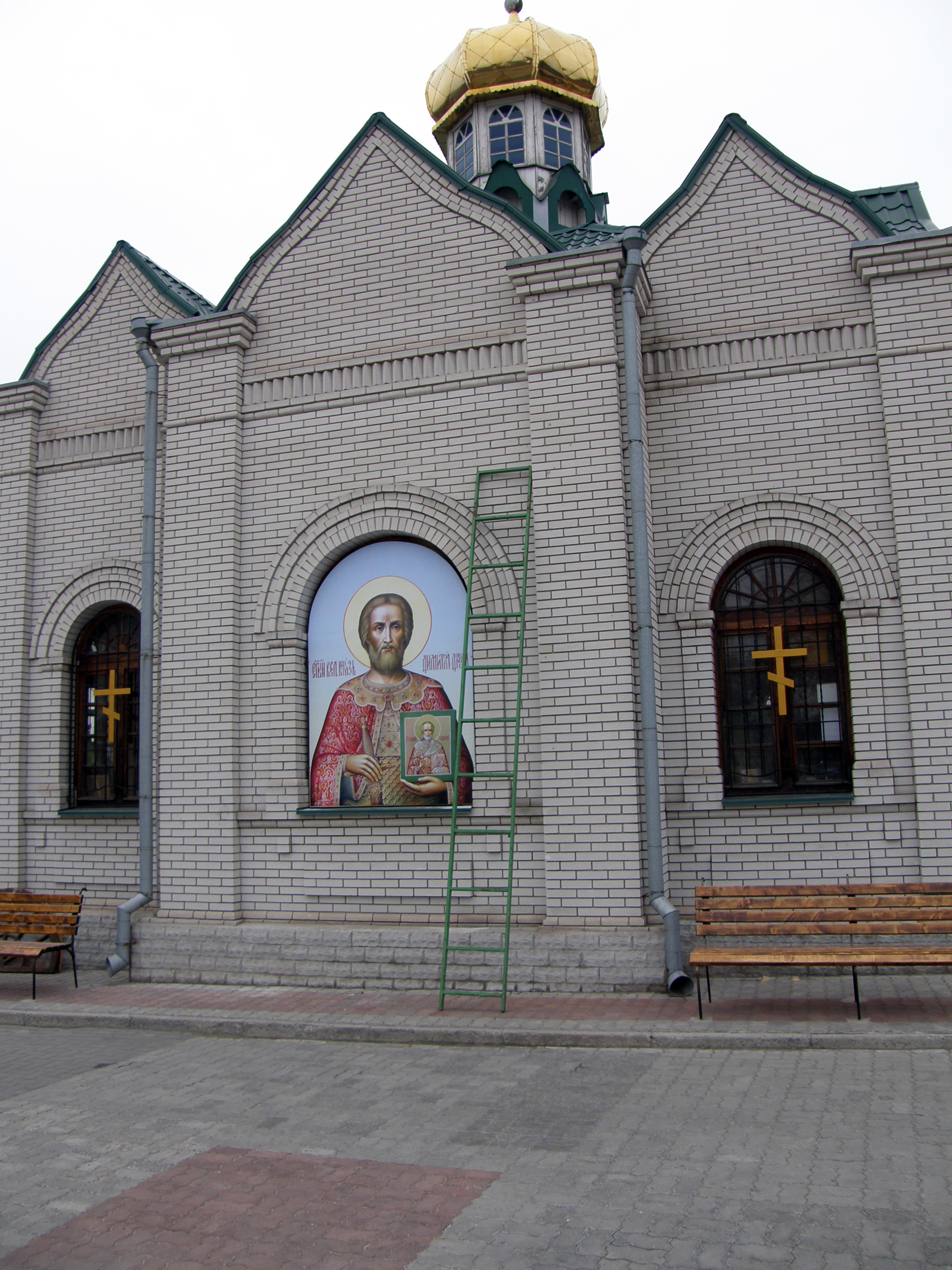 Церква святого Миколая, Запоріжжя, вул. Піщана